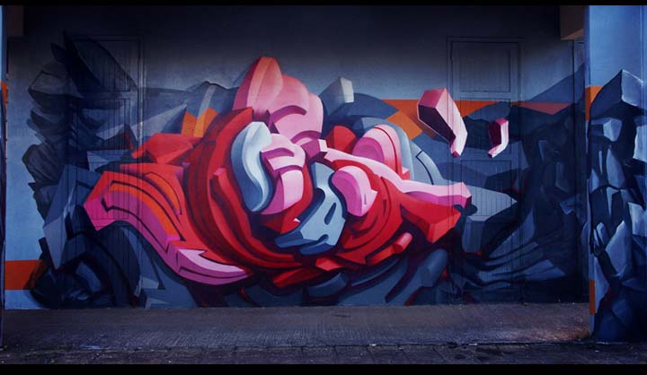 photographie d'un graffiti de LSA ONE Futur Crew